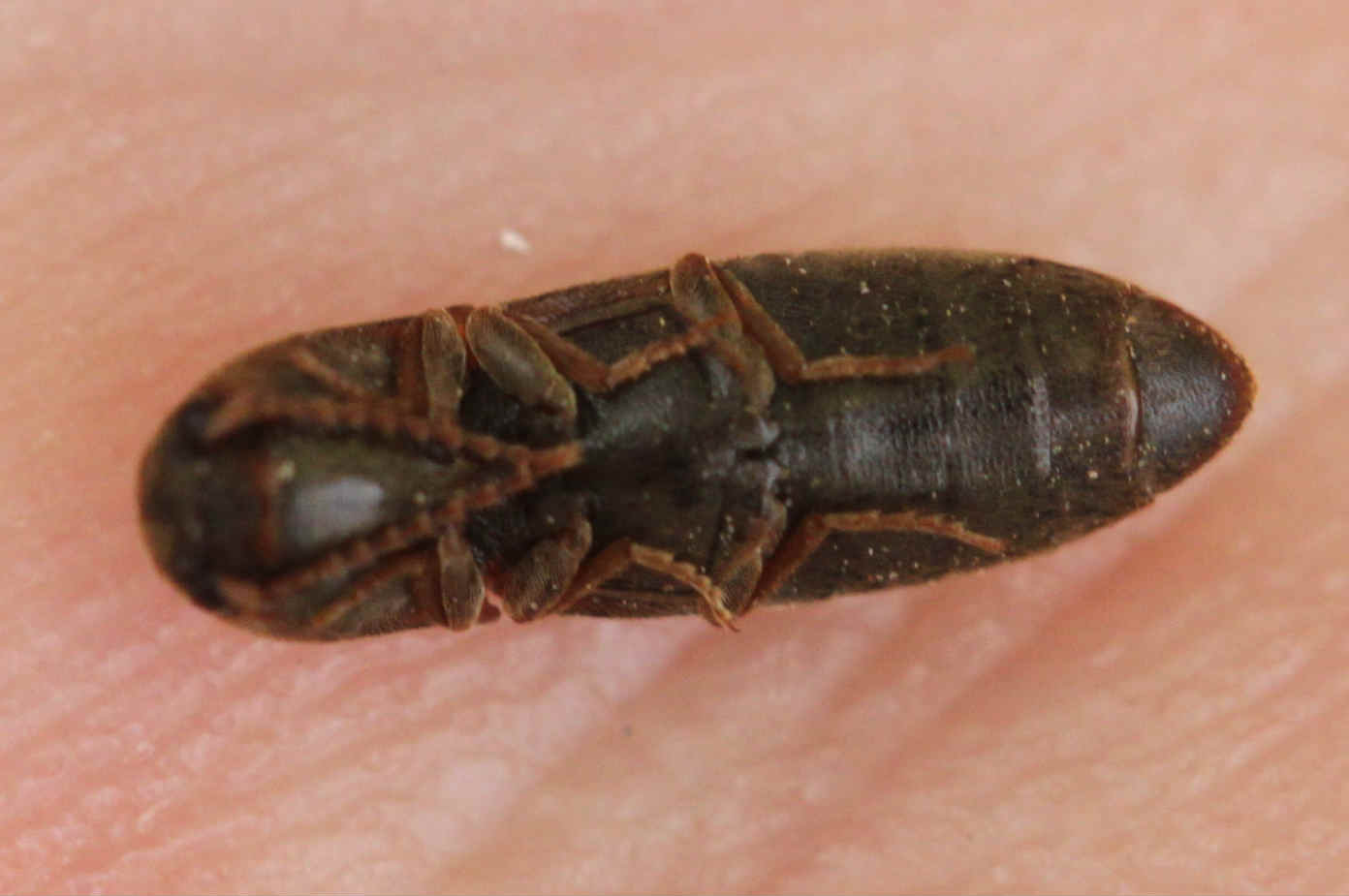 Agriotes sputator, Unterseite, am 10.4.2017 südl. Mannheim